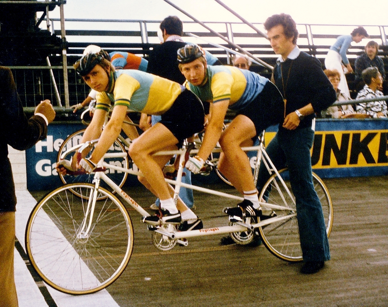 Deutsche Bahnmeisterschaft 1978 Stuttgart, Start Tandem Urnauer/ Kristen- Trainer Lange